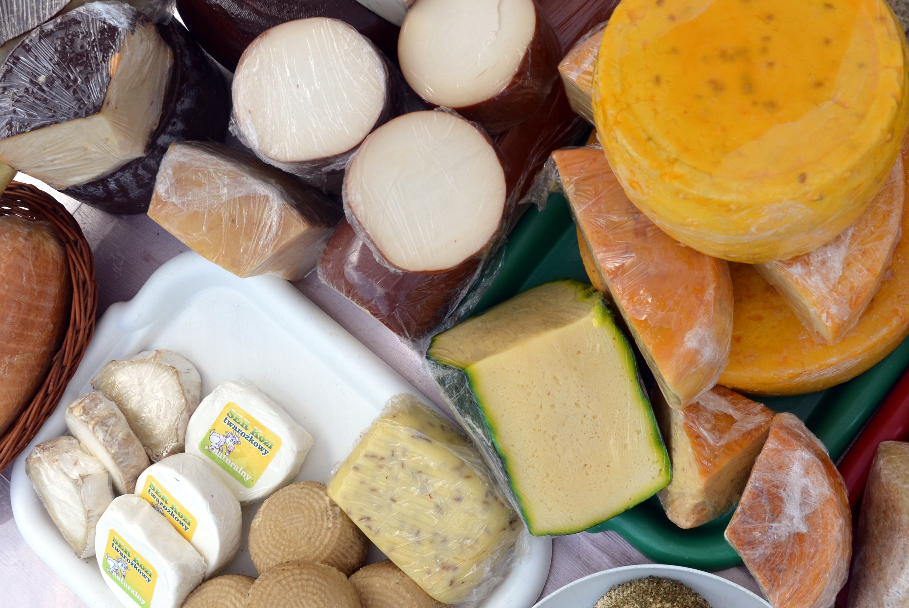 Käse aus Podlachien - Podlachische Spezialitäten